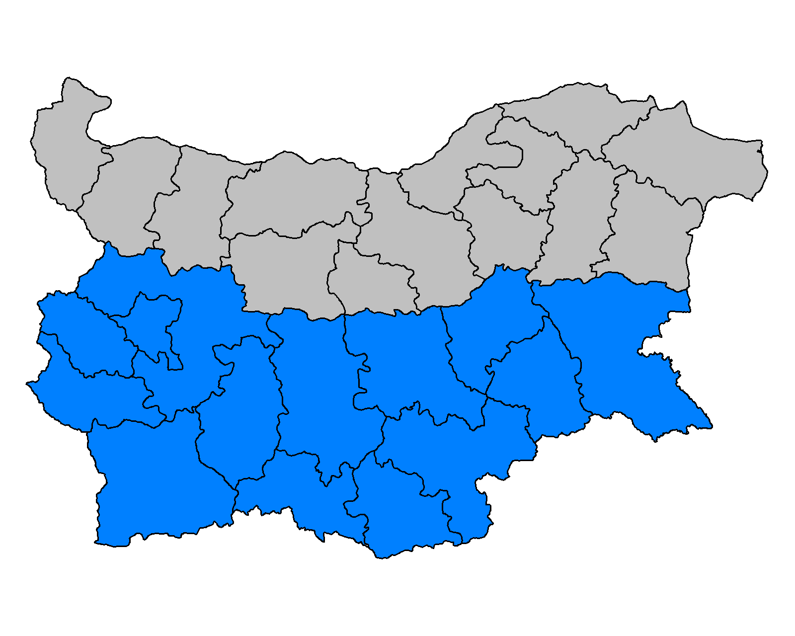 Южна България